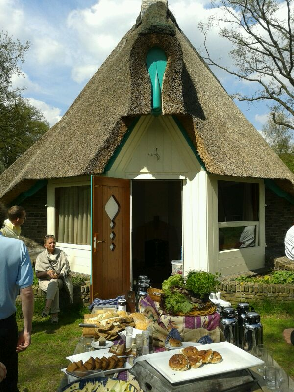 Atelier van Rik Roland-Holst op de Buisse Heide. Architect Margaret Staal-Kropholler